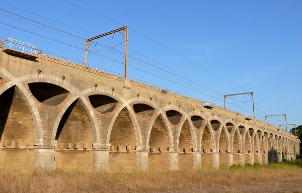 Viaduc de Saint-Chamas, franchissant la Touloubre, Bouches-du-Rhône (13), Provence-Alpes-Côte d'Azur, France